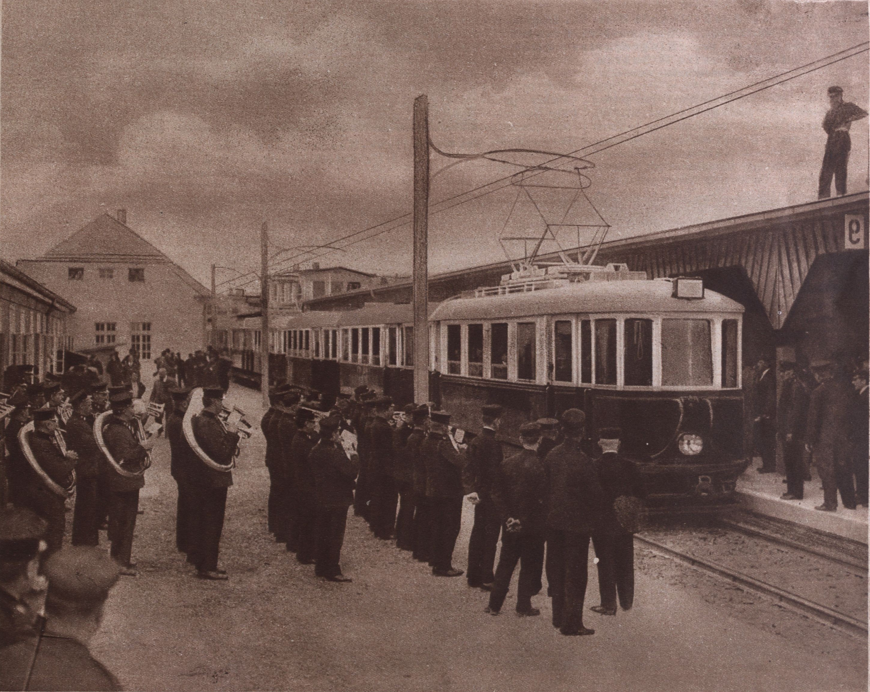 Eröffnung der Wiener elektrischen Stadtbahn. Originalbeschreibung: Der erste elektrische Zug, der mit dem Bundespräsidenten Dr. Hainisch, den Ministern, dem Bürgermeister Seitz und den sonstigen Ehrengästen in der Endstation Hütteldorf eintrifft, wird von der Kapelle der Straßenbahner mit Musik begrüßt.